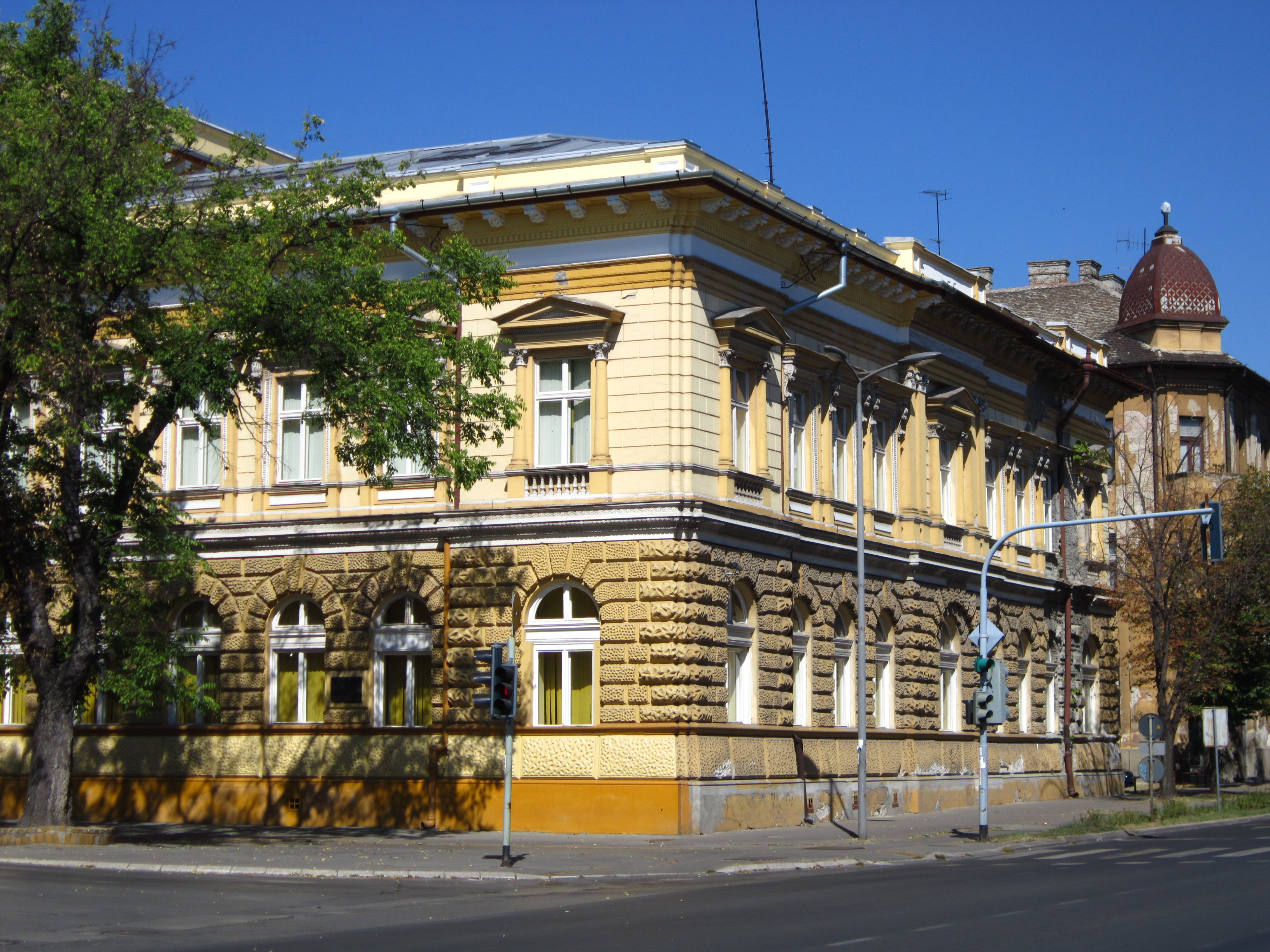 Жута кућа , Штросмајерова 11 , Суботица